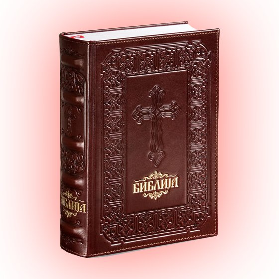 Искористио сам слику корице једне Библије да направим ову слику у програму "Adobe Photoshop 7.0". Избрисао сам позадину, уклонио сенке, мало изменио текст и додао светлост. Дакле, аутор сам ја (Бојан Боровићанин). Оваква слика не постоји нигде на интернету.